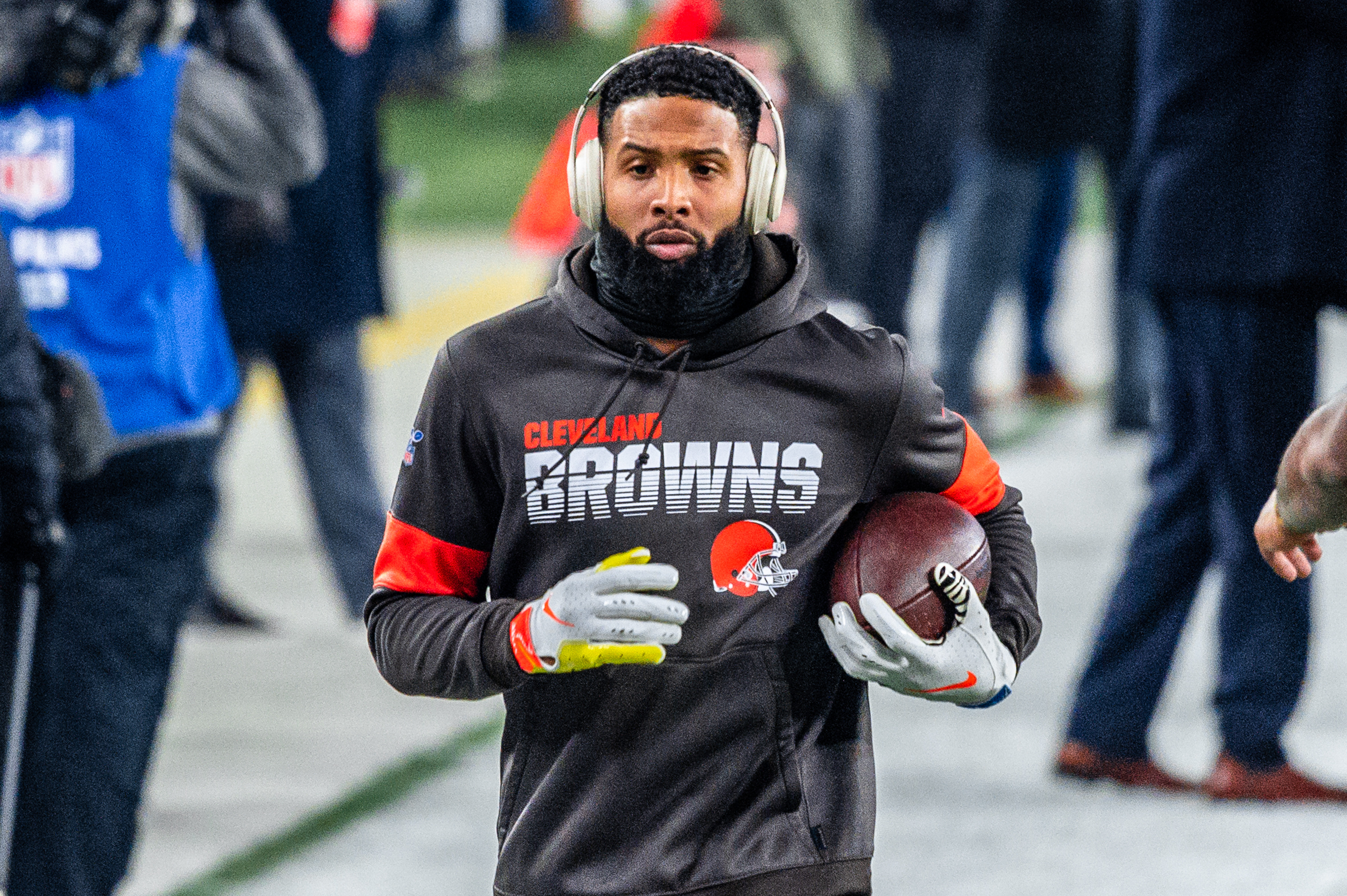 Odell Beckham Jr.